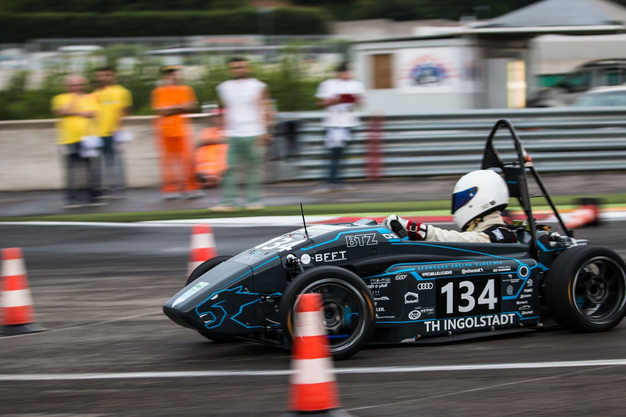 Der studentische Verein Schanzer Racing Electric e. V. nimmt an internationalen Rennen teil.